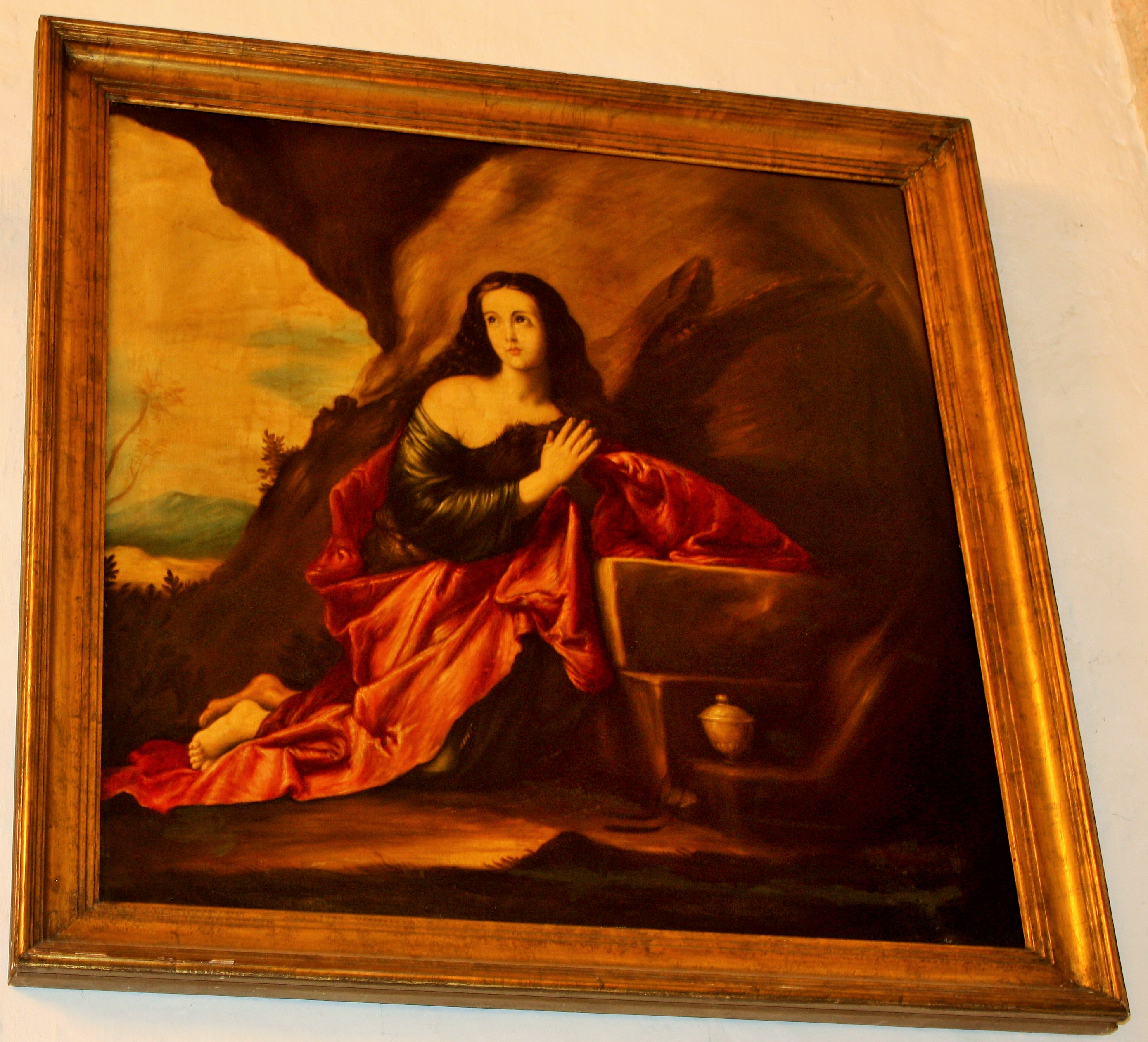 Santa María Magdalena penitente. Copia del original realizado por Francisco Ribera, el "Españoleto".